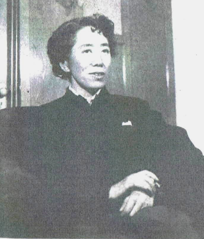 読売新聞社『家庭よみうり』374号（1954年）より秋元松代